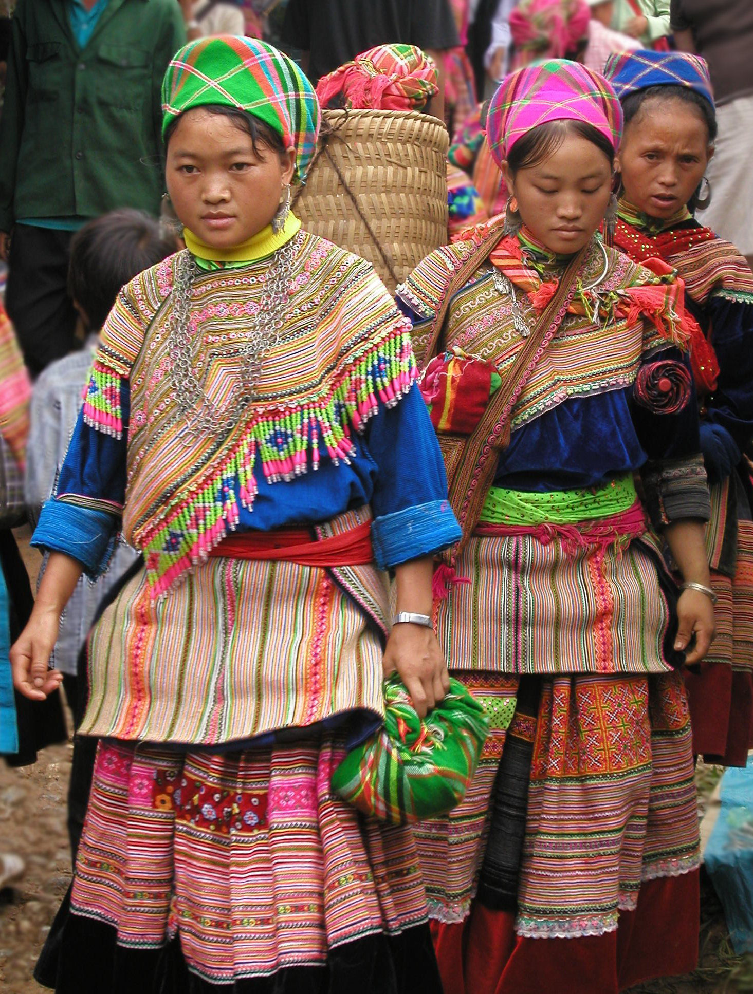 Taken at Coc Ly market, Sapa, Vietnam 2004